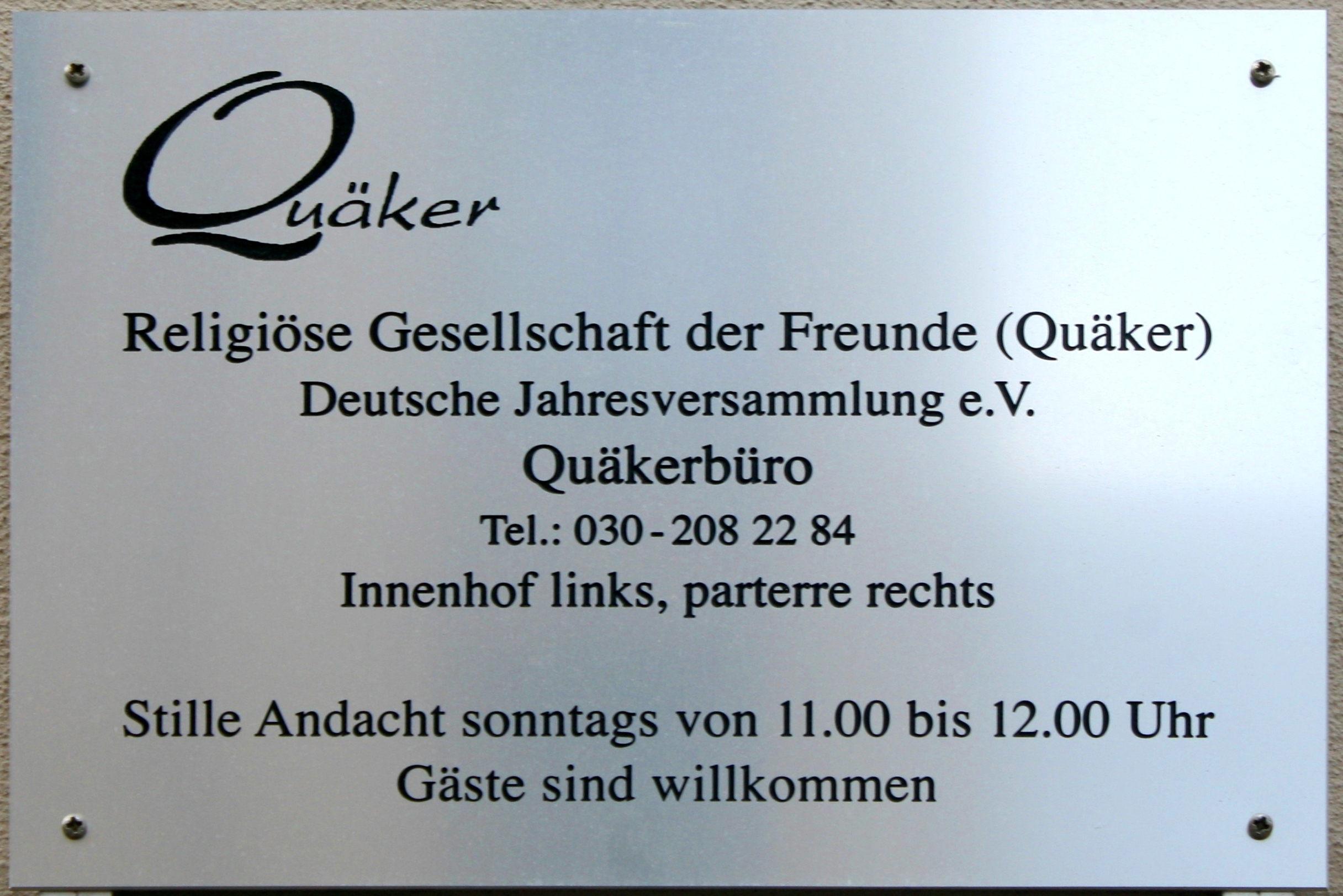 Schild des Quäkerbüros Berlin in der Planckstr. 20